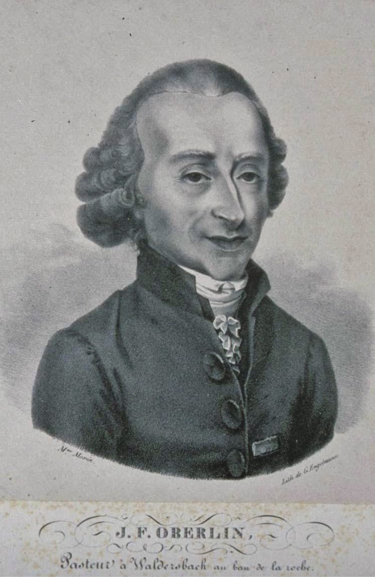 Titre : J.F. Oberlin, Pasteur à Waldersbach, Buste, 3/4 à dr Auteur : Morin, Mme. Illustrateur Auteur : Engelmann, Godefroy ((lithogr)) Éditeur : s.n (S.l) Date d'édition : 1820 Sujet : Strasbourg Sujet : Waldersbach Sujet : PORTRAIT, Oberlin (Jean-Frédéric) Type : image fixe Langue : Français Format : 42,8 x 29,1 cm ; 22,8 x 17,8 cm Format : image/jpeg Droits : domaine public Identifiant : ark:/12148/btv1b10208595t Source : Bibliothèque nationale et universitaire de Strasbourg, NIM16843 Relation : Description : Appartient à l’ensemble documentaire : BNUStr003 Provenance : bnf.fr Date de mise en ligne : 23/09/2013